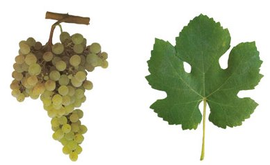 Blatt und Traube der Weißweinsorte 'Arinto'